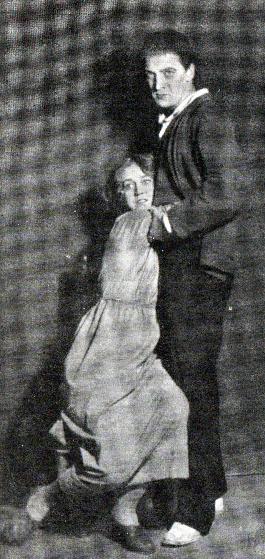 Hoppla, vi lever! (Drama by Ernst Toller) Alf Sjöberg och Anna Lindahl i huvudrollerna som Karl Thomas och Eva Berg i Dramatens uppsättning, Stockholm 1928. Hoppla, wir leben! Inscenierung Stockholm, 1928.